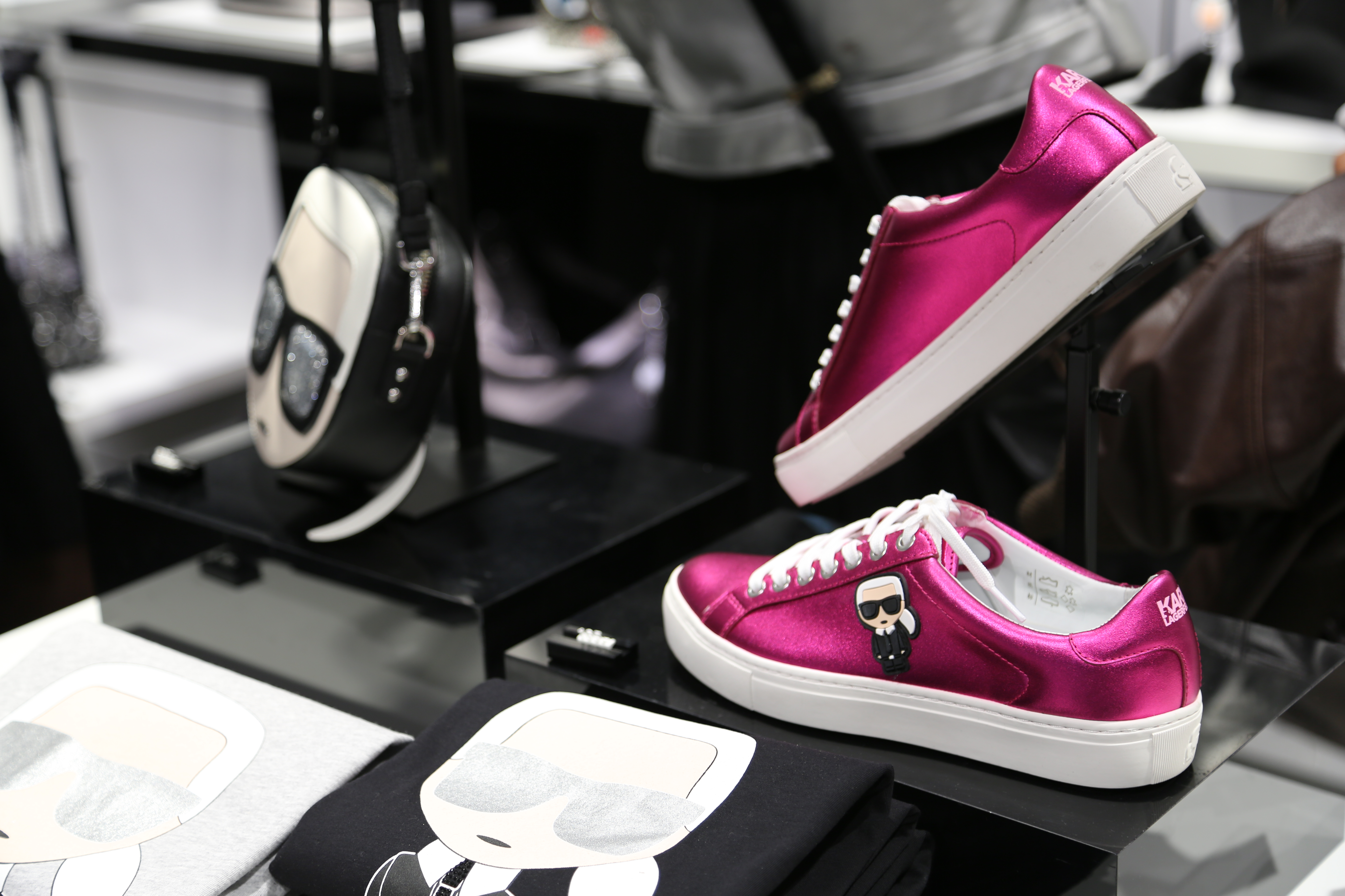 'Karl Lagerfeld' Store in der Kö-Galerie Düsseldorf.